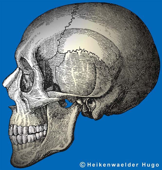 Skull – Schaedel, Anatomic Design